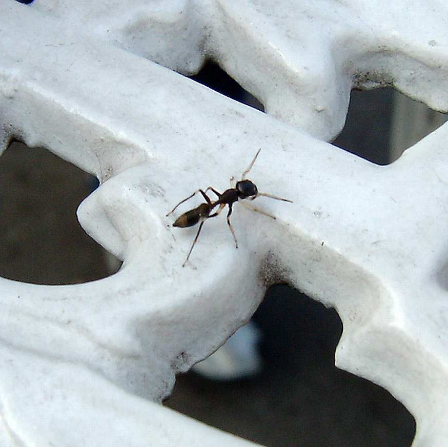 ヤサアリグモ Myrmarachne inermichelis